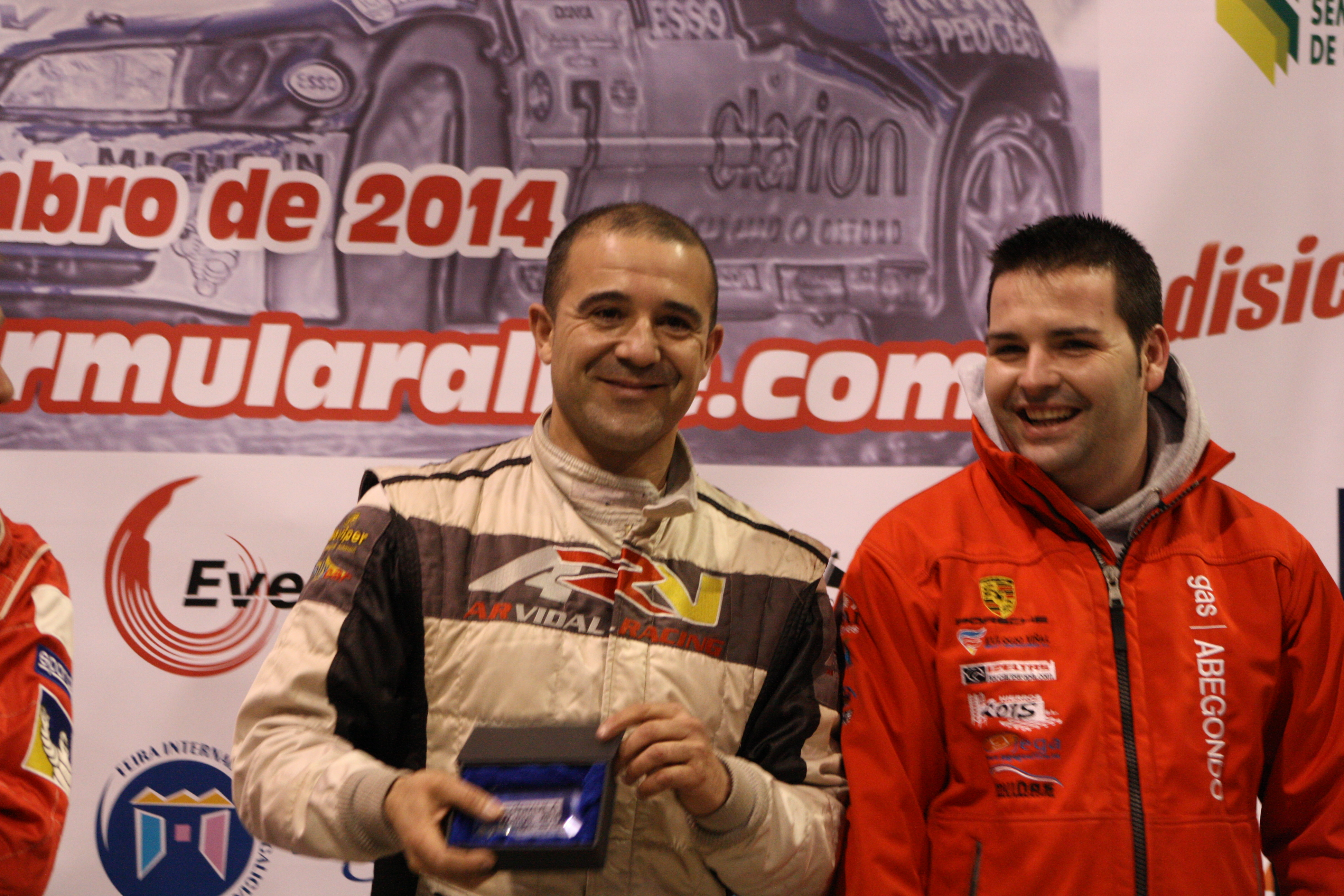 Formula Rally do Cocido 2014 celebrado en el Recinto Feiral de Silleda.